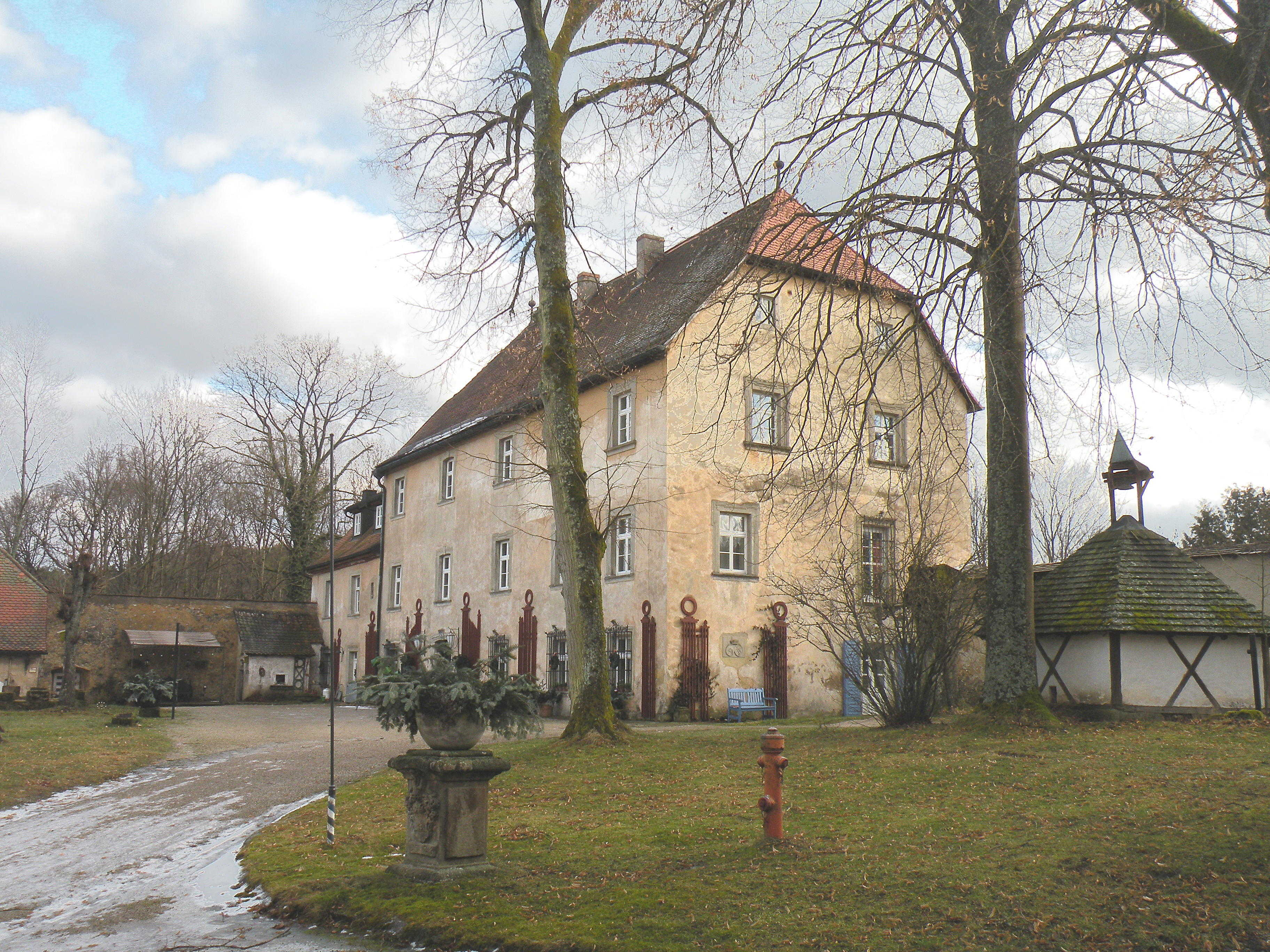 Франконская Швейцария. Замок Оберауфзес